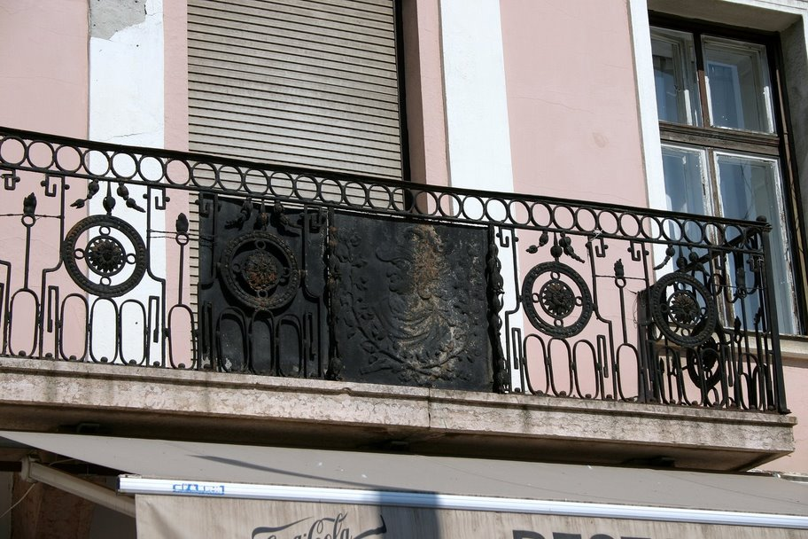 Szeged: Grünn Orbán-ház erkélye